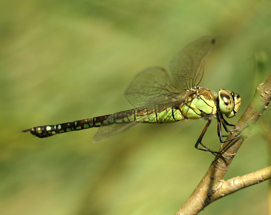 Aeshna affinis, Southern Migrant Hawker, Südliche Mosaikjungfer, Zuidelijke Glazenmaker Female side view Author: Robert Geerts